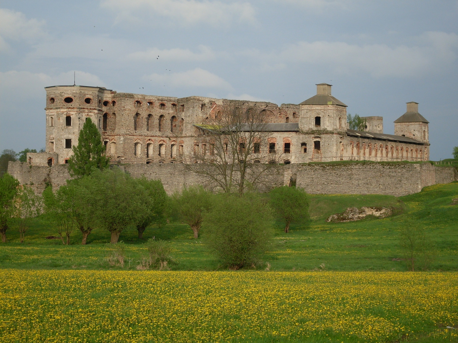 Ruiny zamku Krzyżtopór Ujazd